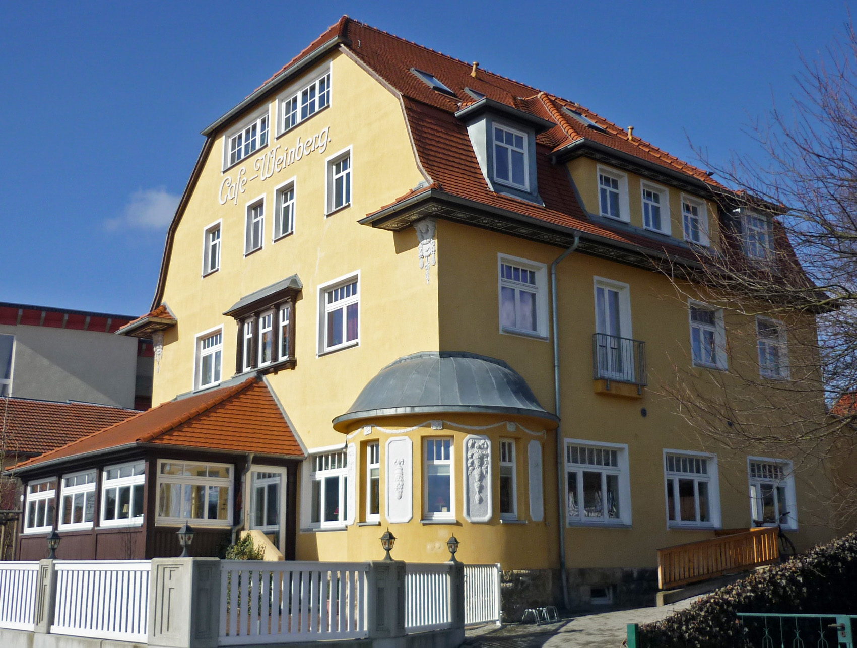 Kaitzer Weinberg 12 in Dresden-Kaitz (Cafe Weinberg)